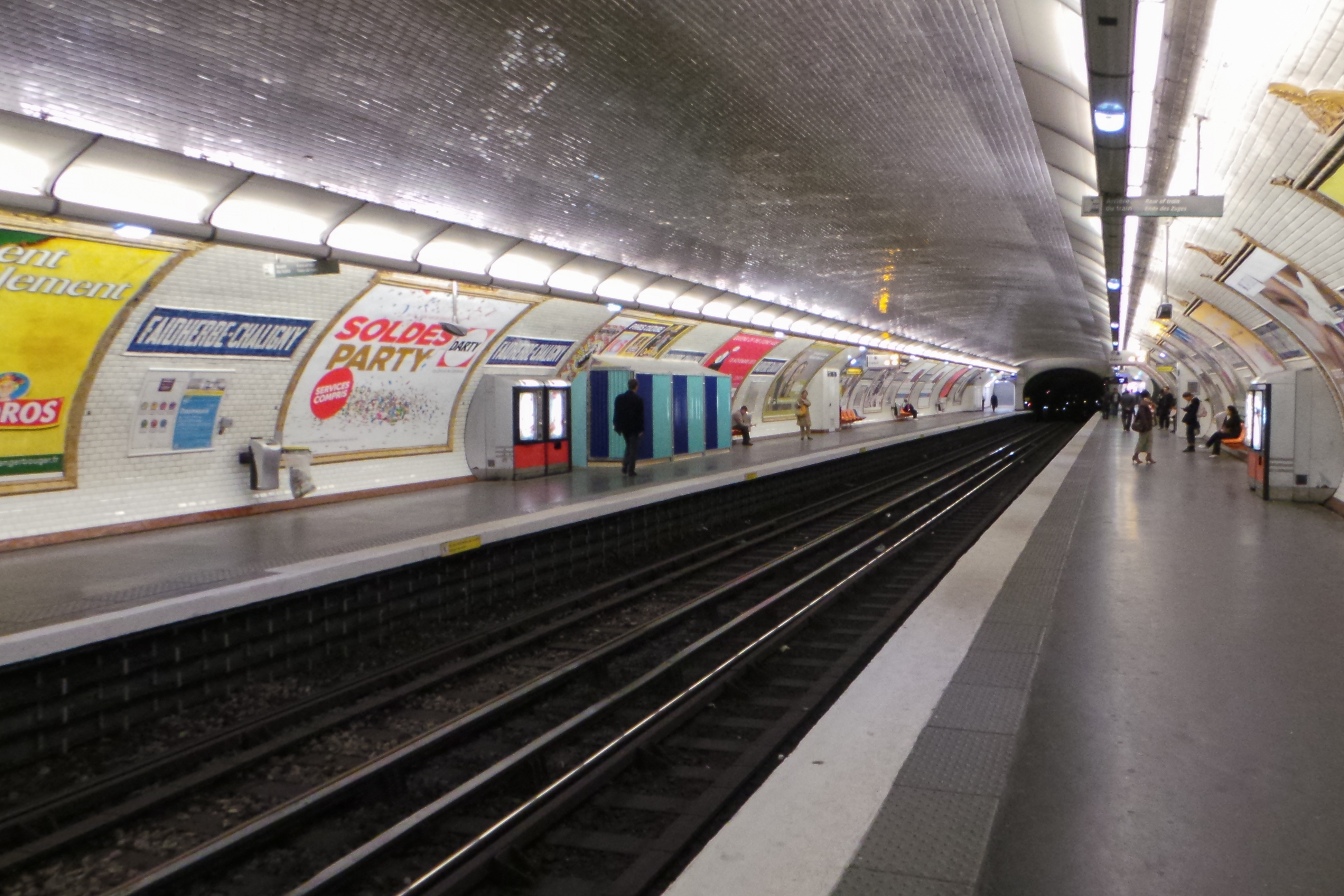 Station de métro Faidherbe - Chaligny, métro de Paris ligne 8, Paris, France